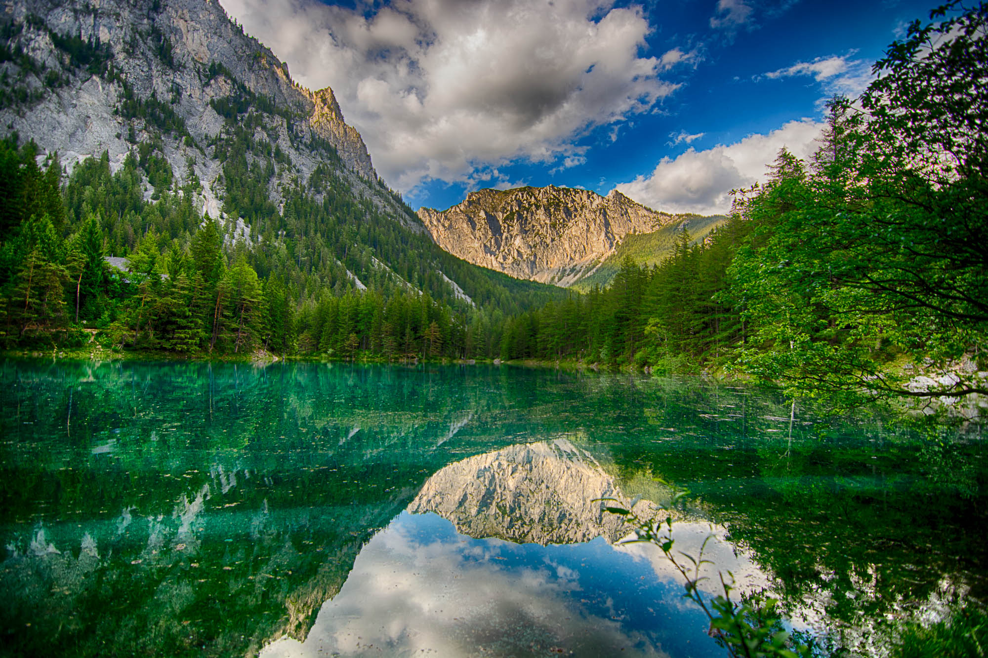 Grüner See Ausblick. Bergwelt This media shows the nature reserve in Styria with the ID NSG 19 a.